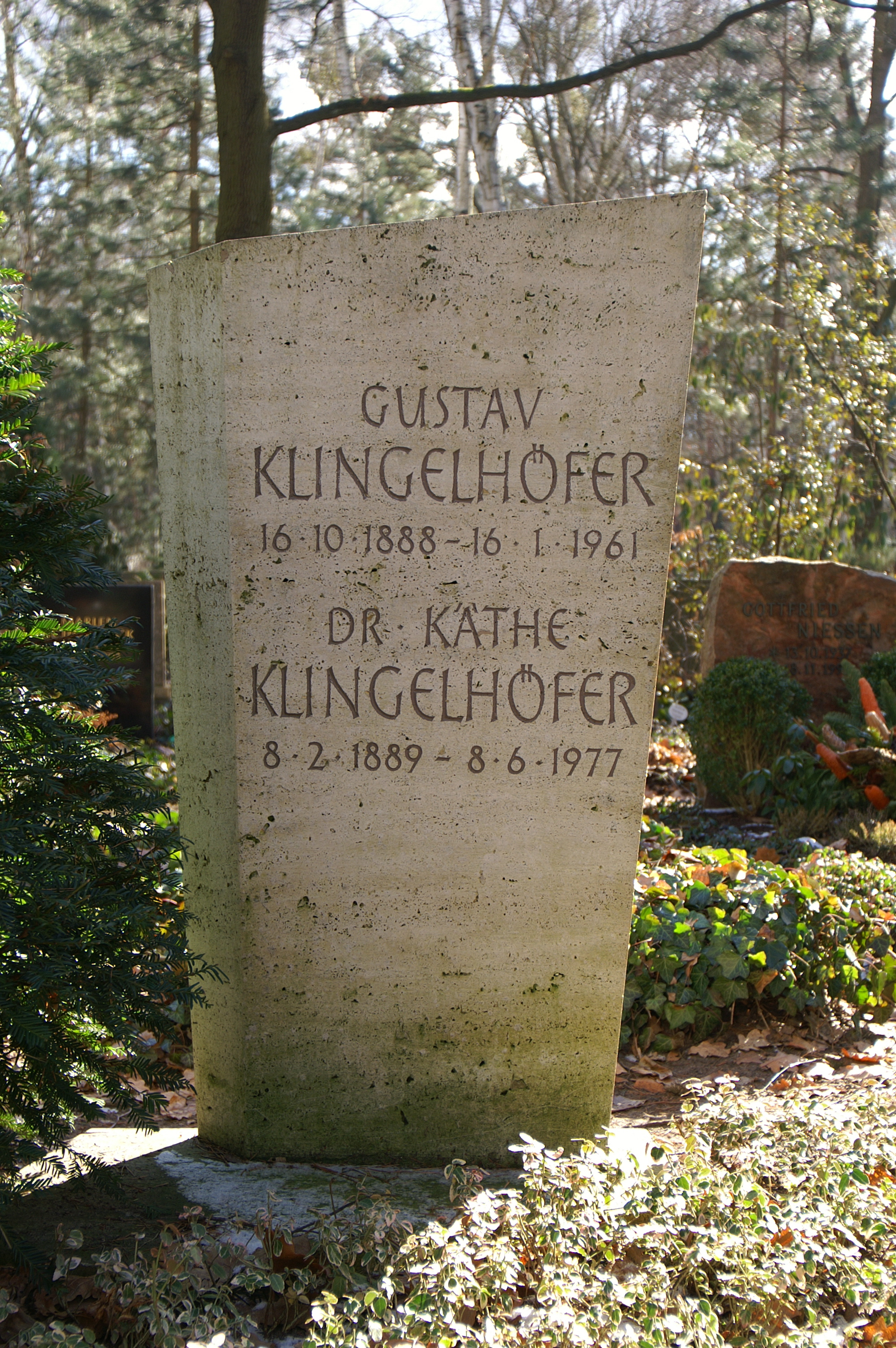 Das Bild zeigt das Grab des Berliner SPD-Politikers Gustav Klingelhöfer auf dem Waldfriedhof Zehlendorf.